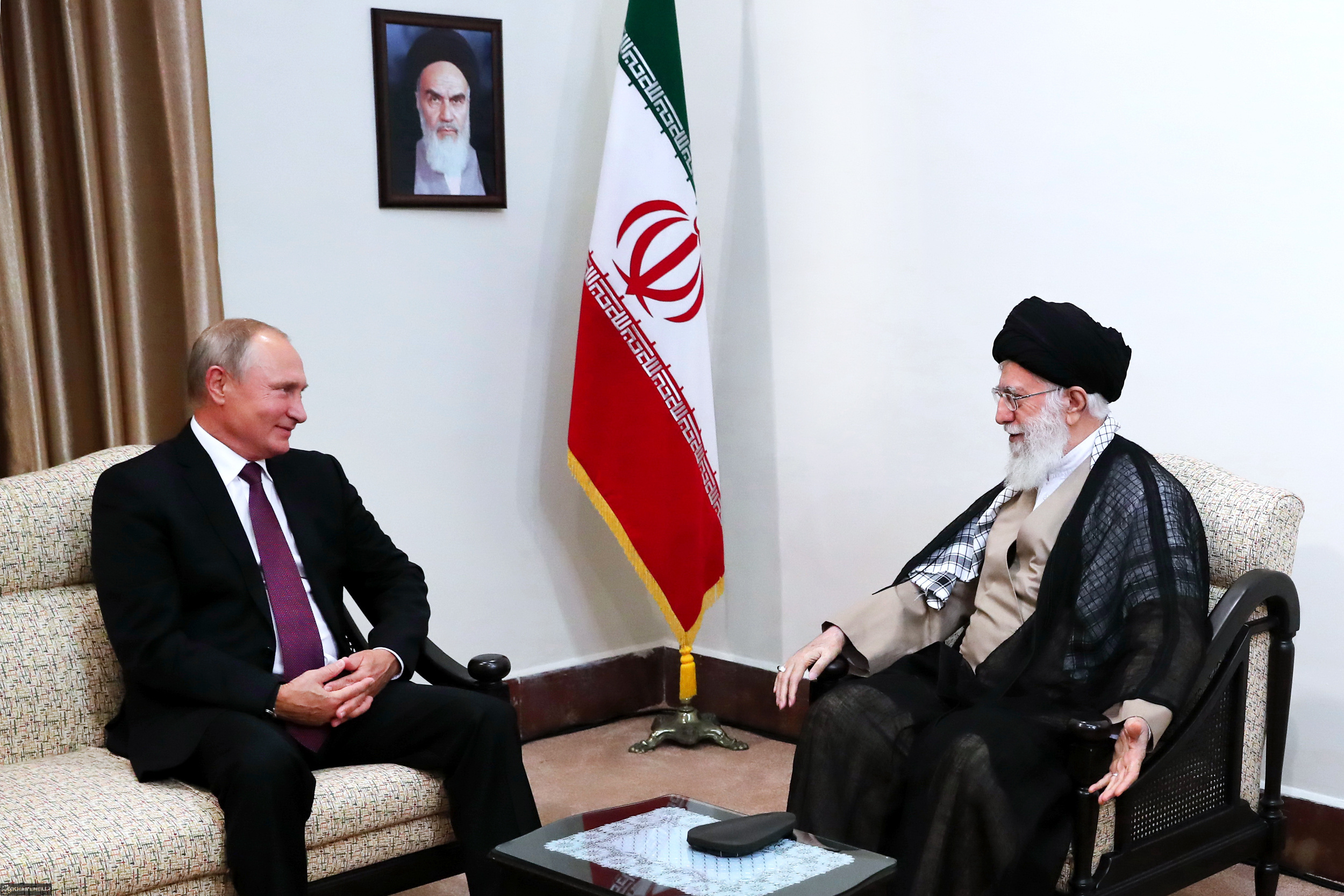 Встреча Президента России Владимира Путина с Верховным руководителем и духовным лидером Исламской Республики Иран аятоллой Али Хаменеи